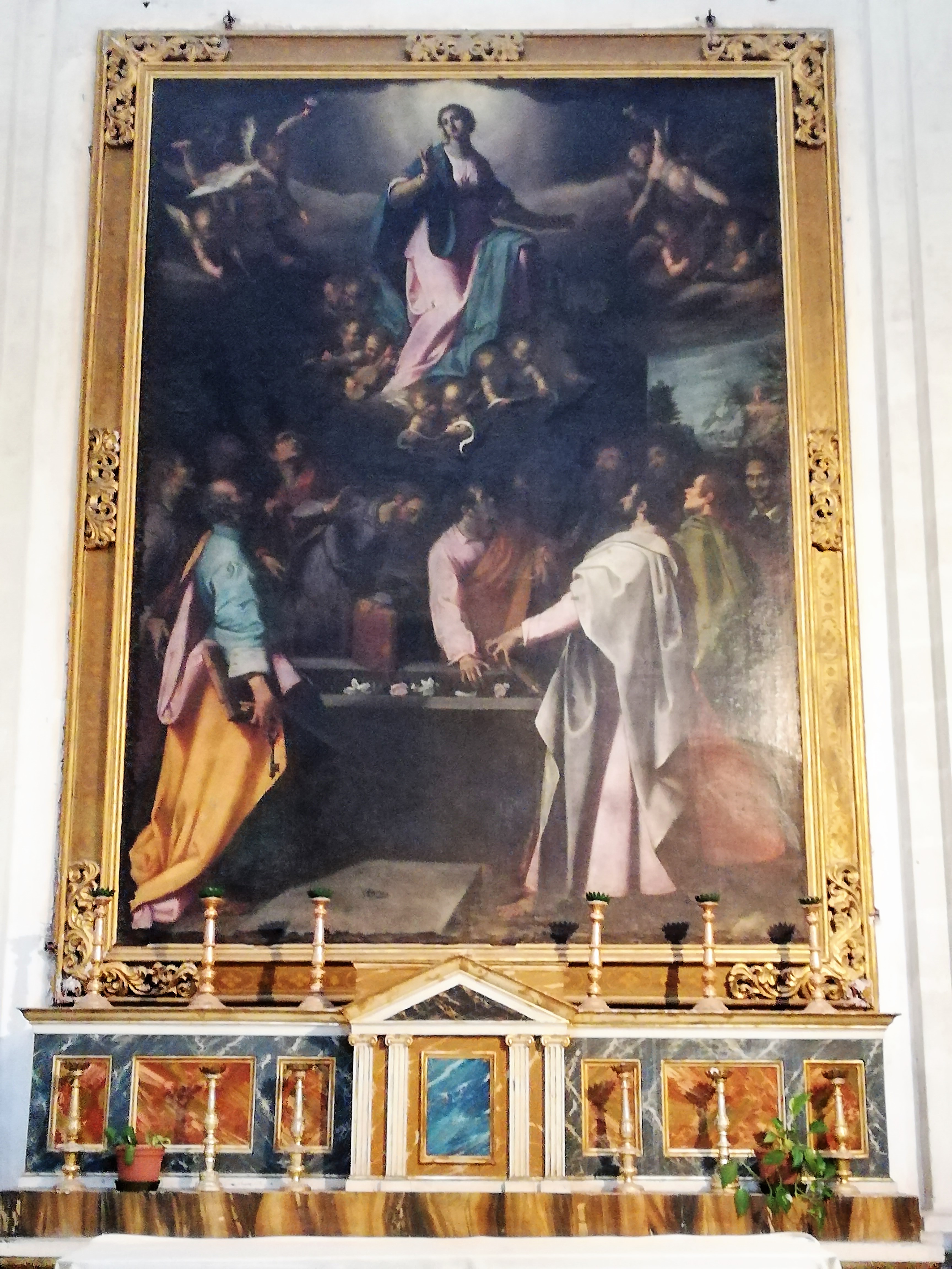 Assunta, opera di Filippo Paladini del 1610, basilica di San Giorgio, Modica.